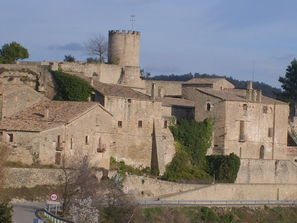 Castell de Talamanca (Bages)